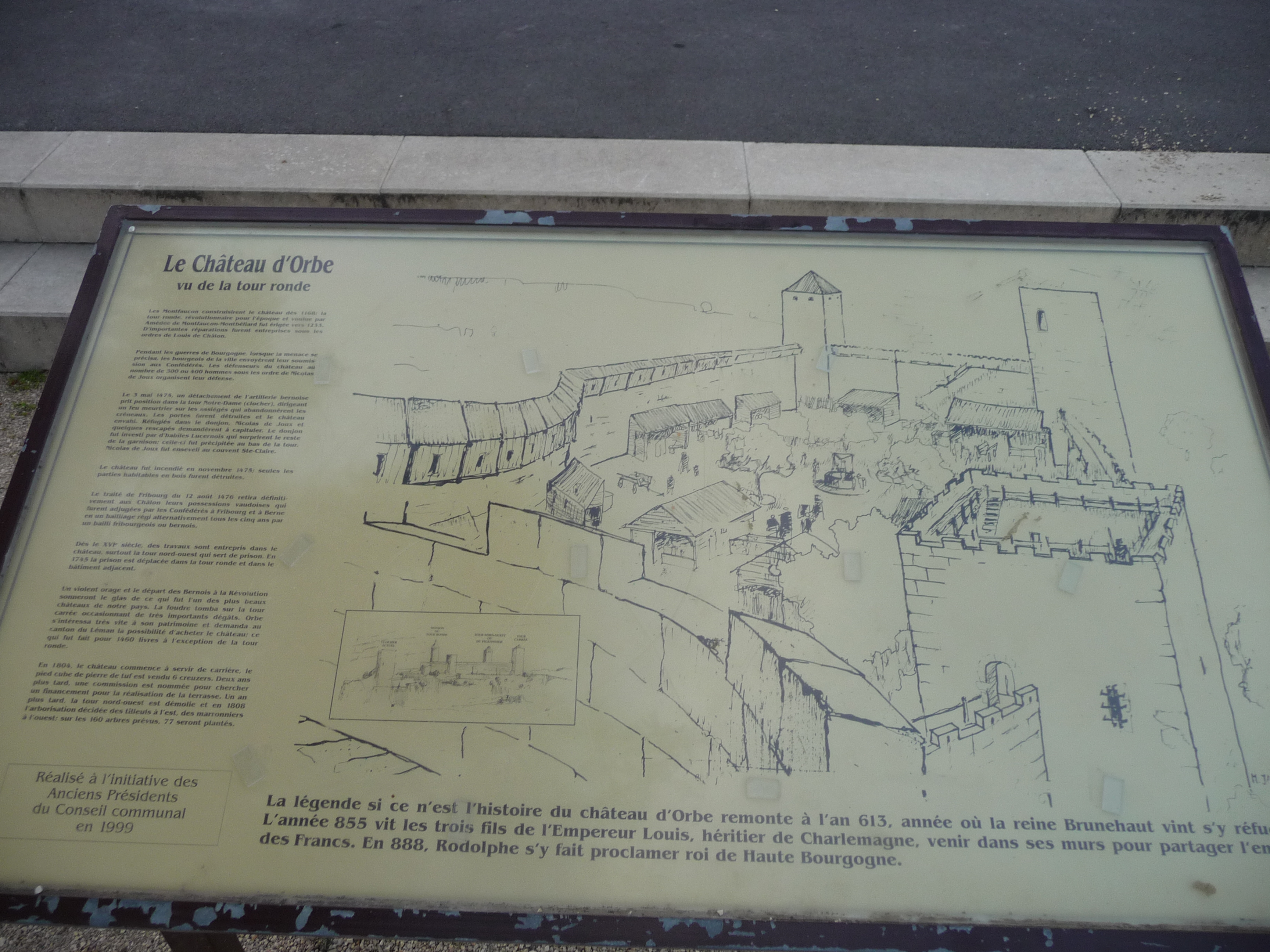 Orbe.